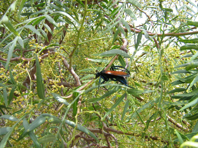 Pepsis sp.